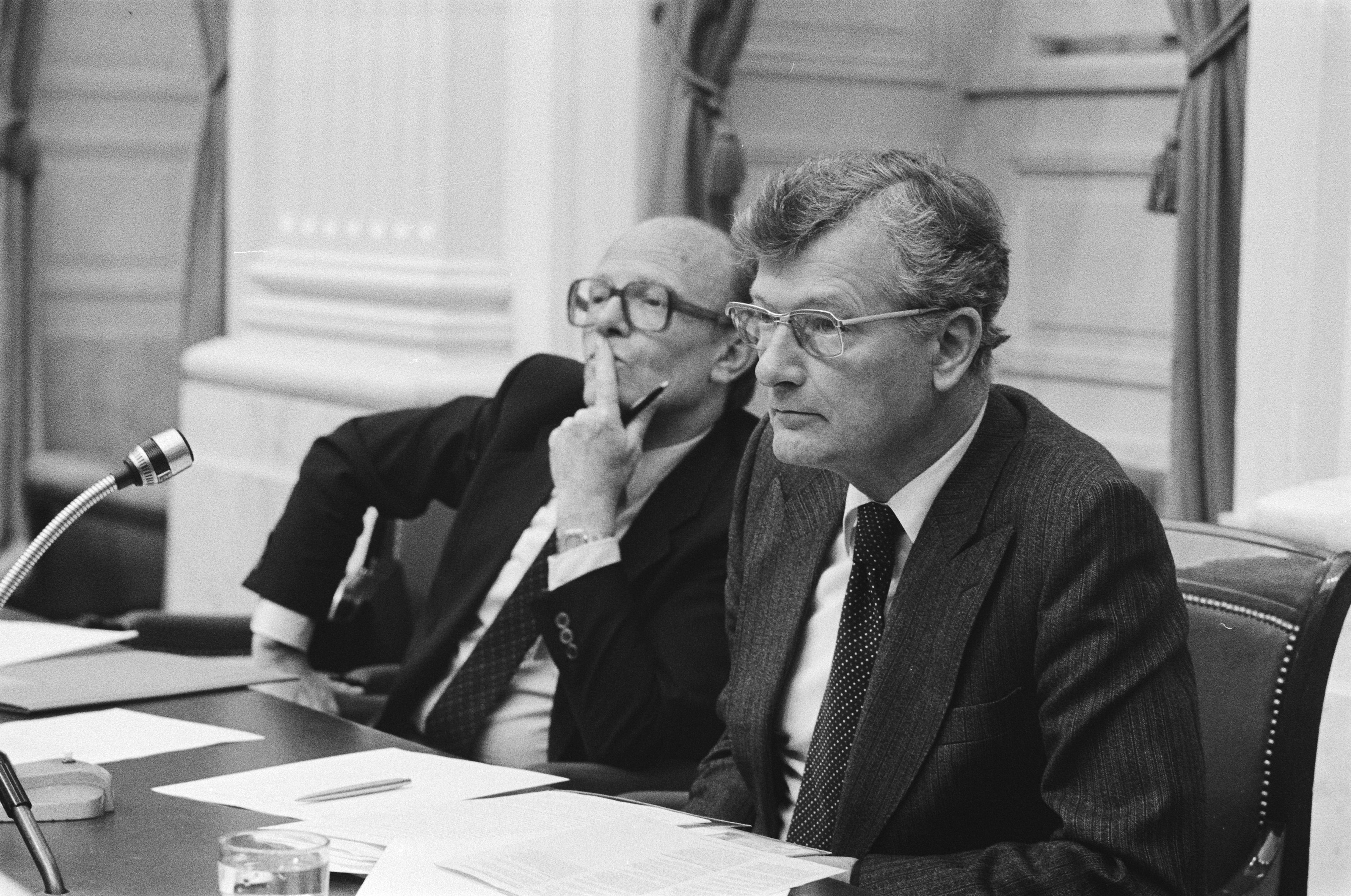 Collectie / Archief : Fotocollectie Anefo Reportage / Serie : Interpellatie over de vakantietoeslag van ambtenaren door dhr. Weijers (CDA) en dhr. Van den Burg (CDA) in de Tweede Kamer Beschrijving : Minister de Koning (Sociale Zaken) (r) en minister Rietkerk (Binnenlandse Zaken) Datum : 29 juni 1983 Locatie : Den Haag, Zuid-Holland Trefwoorden : ambtenaren, arbeidsvoorwaarden, ministers, parlementaire debatten Persoonsnaam : Koning, Jan de, Rietkerk, Koos Instellingsnaam : Ministerie van Sociale Zaken Fotograaf : Croes, Rob C. / Anefo Auteursrechthebbende : Nationaal Archief Materiaalsoort : Negatief (zwart/wit) Nummer archiefinventaris : bekijk toegang 2.24.01.05 Bestanddeelnummer : 932-6363